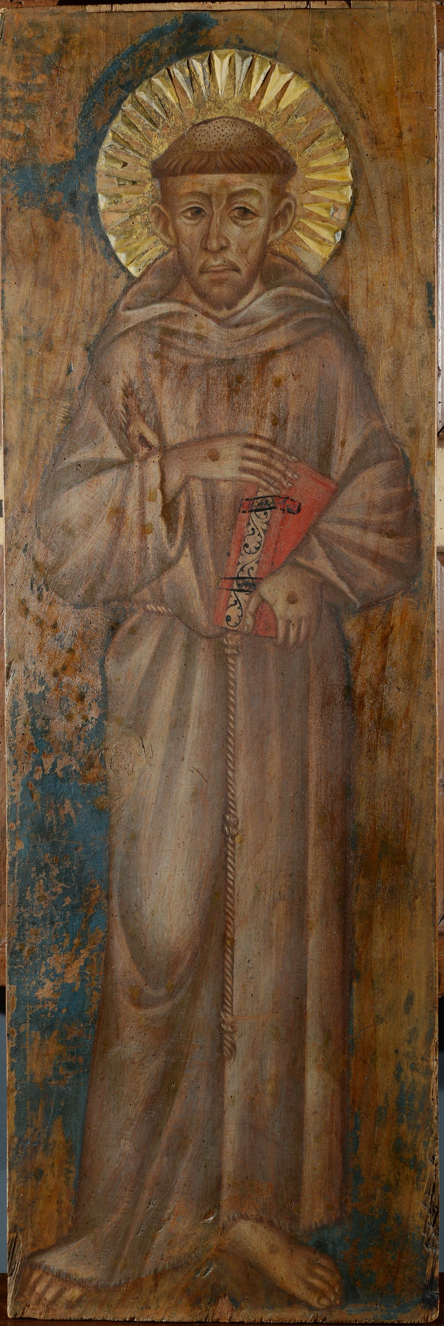 Cimabue (attr.), tavola di san francesco, museo della porziuncola